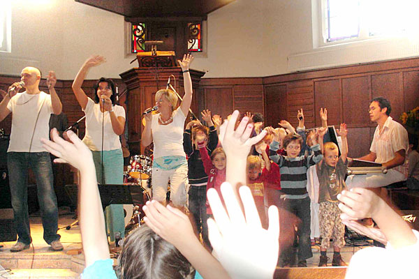 Amio tijdens een schooldienst in Lichtenvoorde